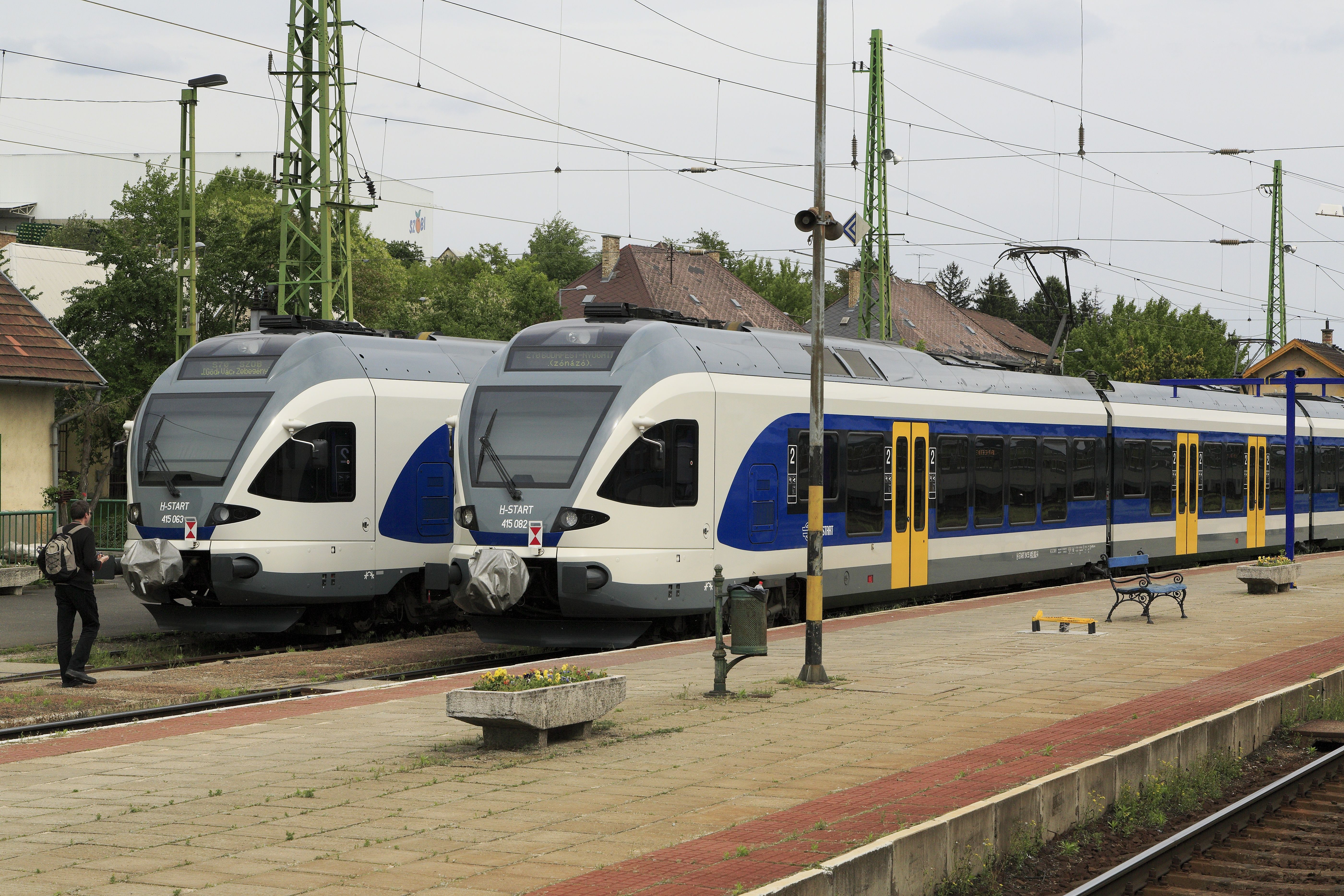 Stadler-Regionalverkehrstriebzüge von H-Start, die eingebauten Schlusssignallampen werden nicht genutzt. Warum das so gehandhabt wird, ist nicht zu erkennen. Trotz der technischen Möglichkeit mit identischer Fahrdrahtspannung und Palettenbreite sowie umfangreichen verwandschaftlichen Beziehungen der Bevölkerung auf beiden Seiten der Grenze besteht zwischen der Slowakei und Ungarn kein durchgehender Regionalverkehr.